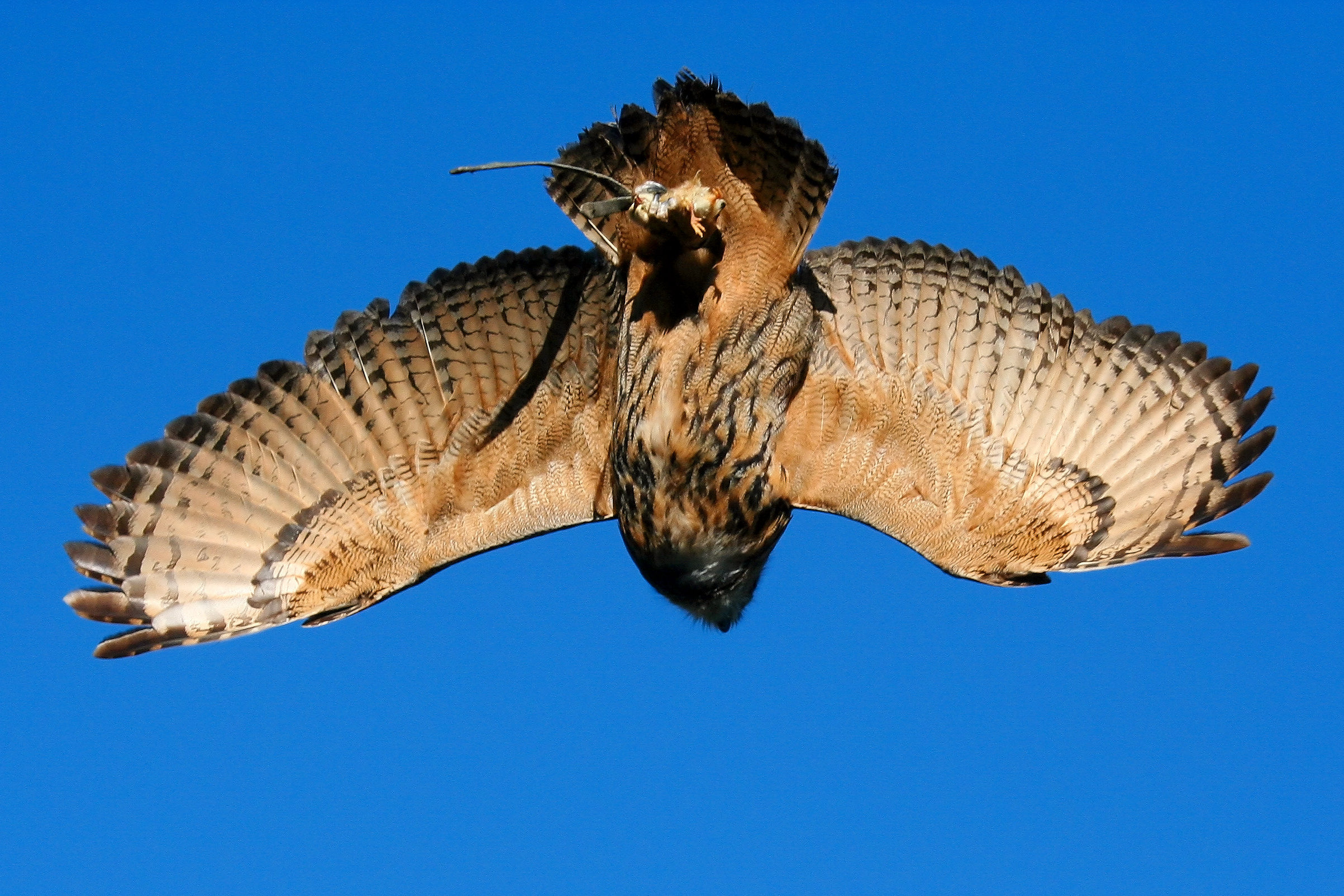 Aragonés: Envista inferior de B. bubo en volido.